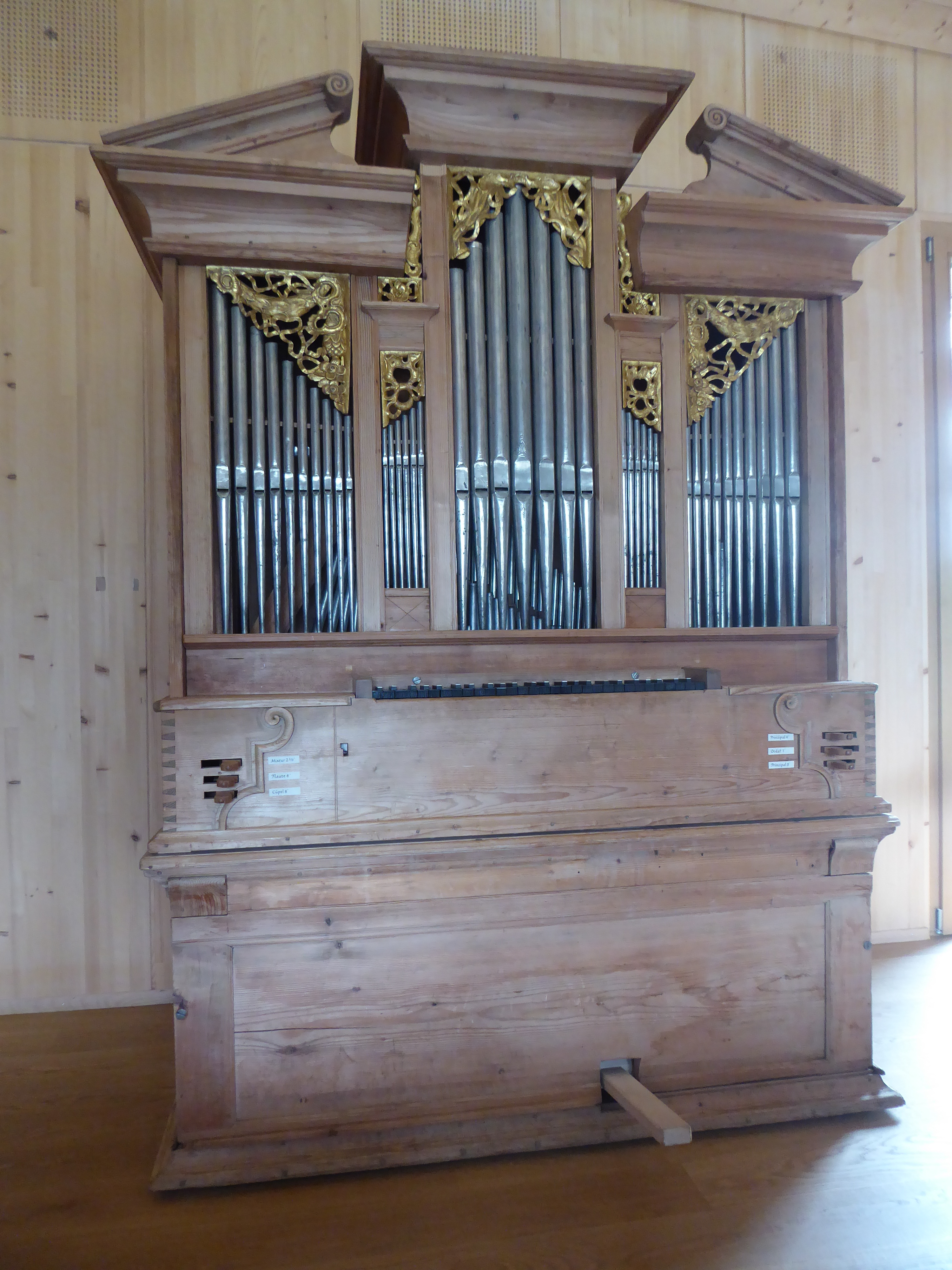 Toggenburger Hausorgel von Melchior Grob (Hemberg), 1793